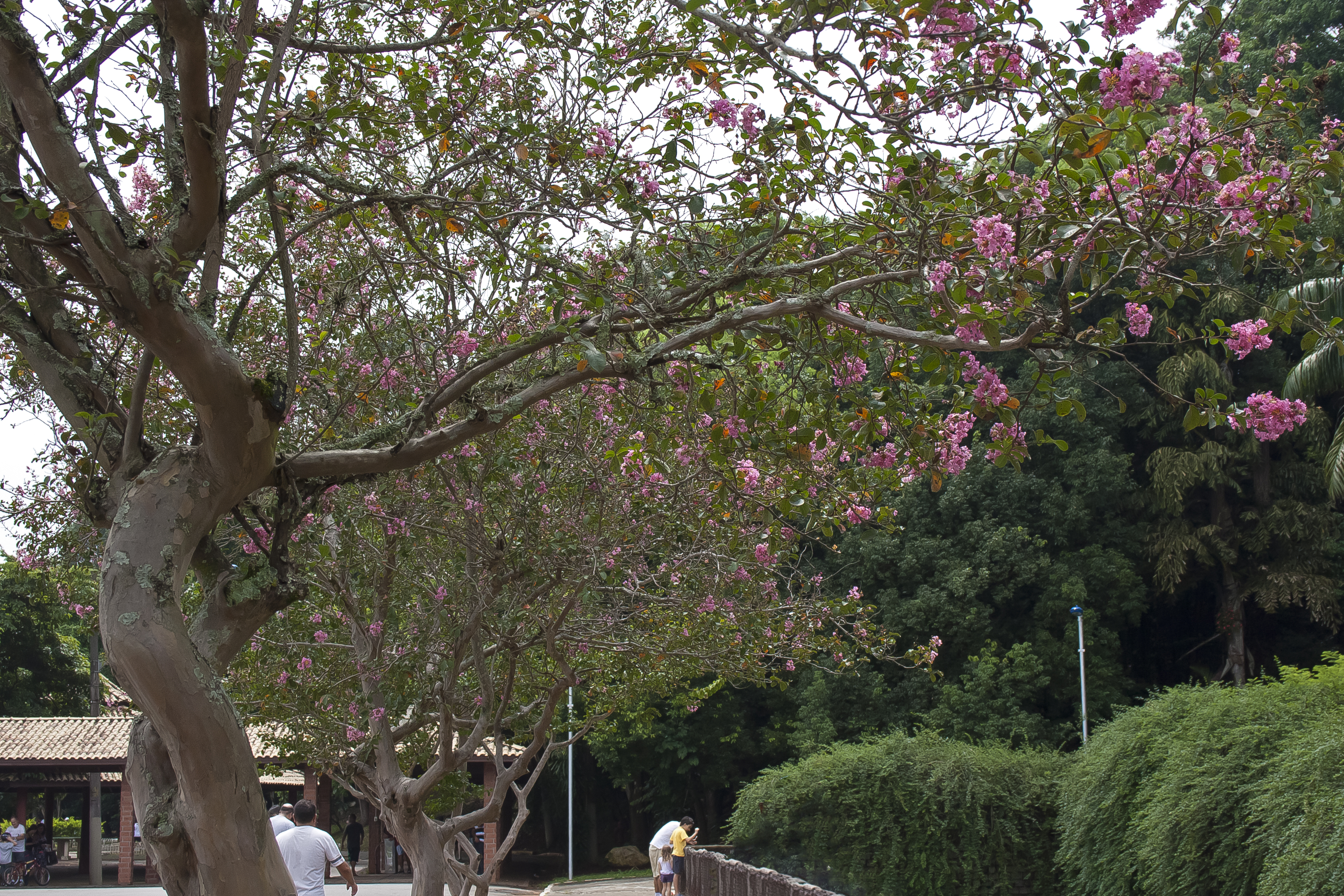 São Caetano do Sul 02/2013